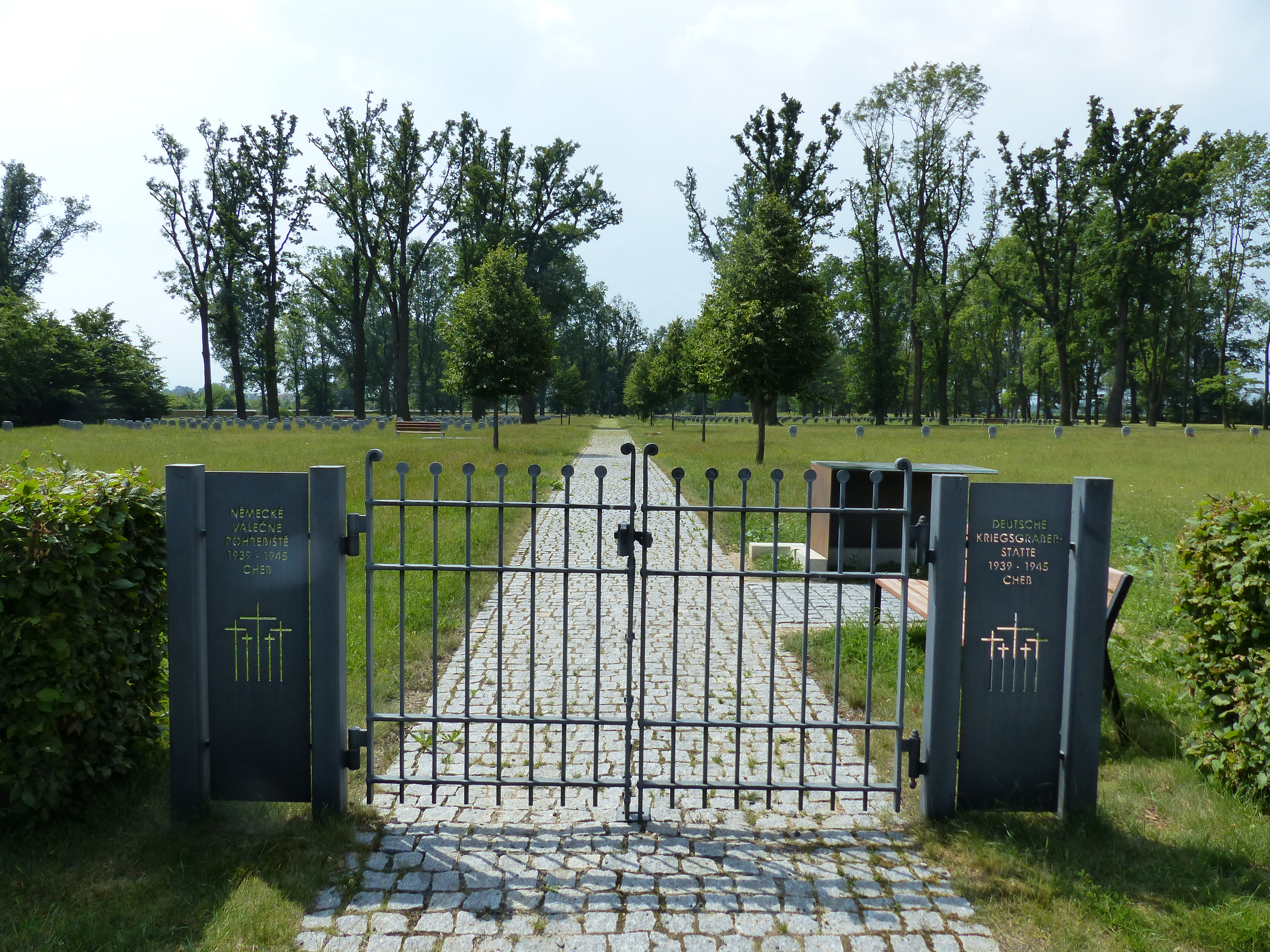 Bildeserie Kriegsgräberstätte Cheb auf dem Stadtfriedhof